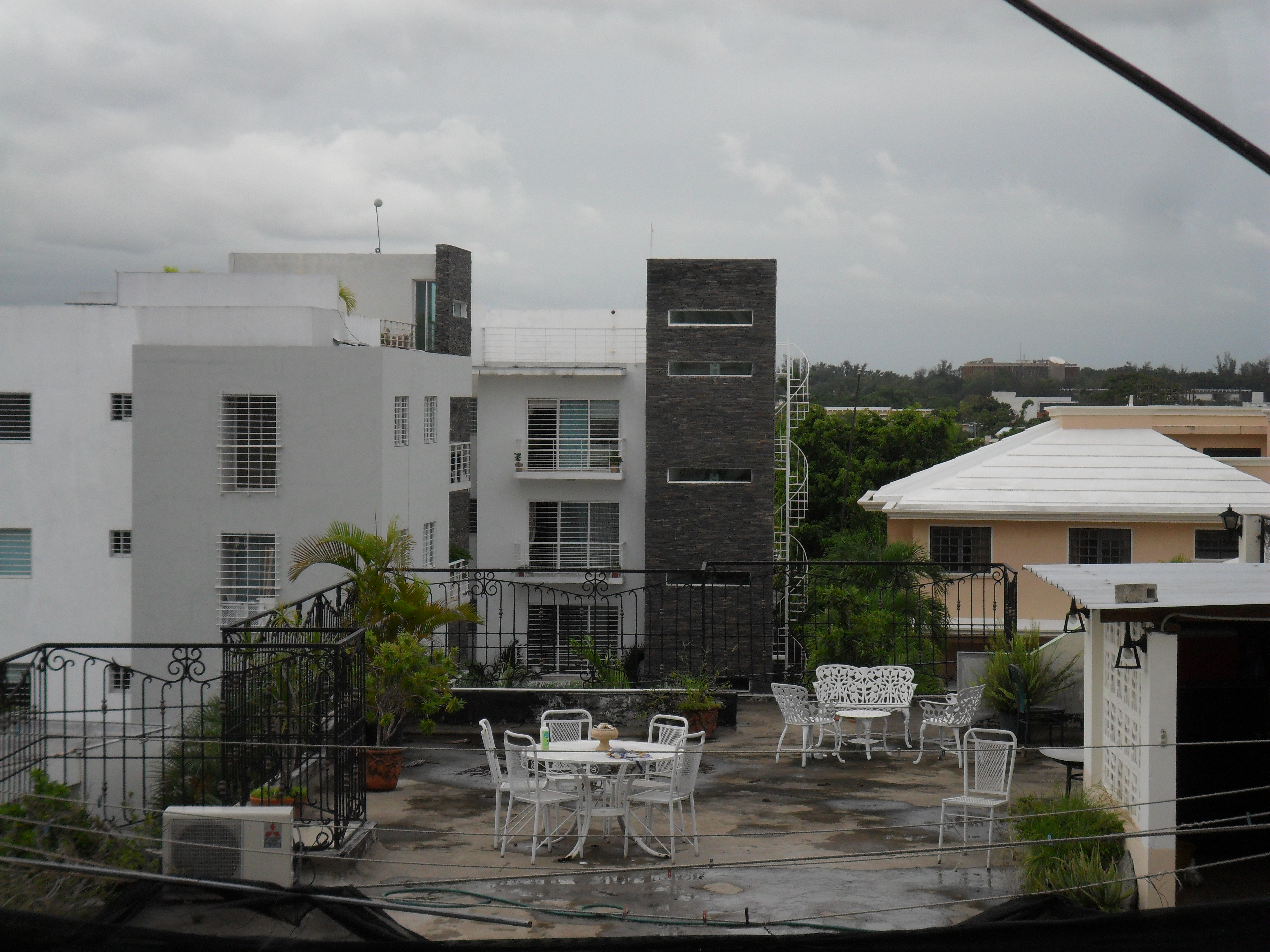 Santo Domingo antes del Huracán Emily